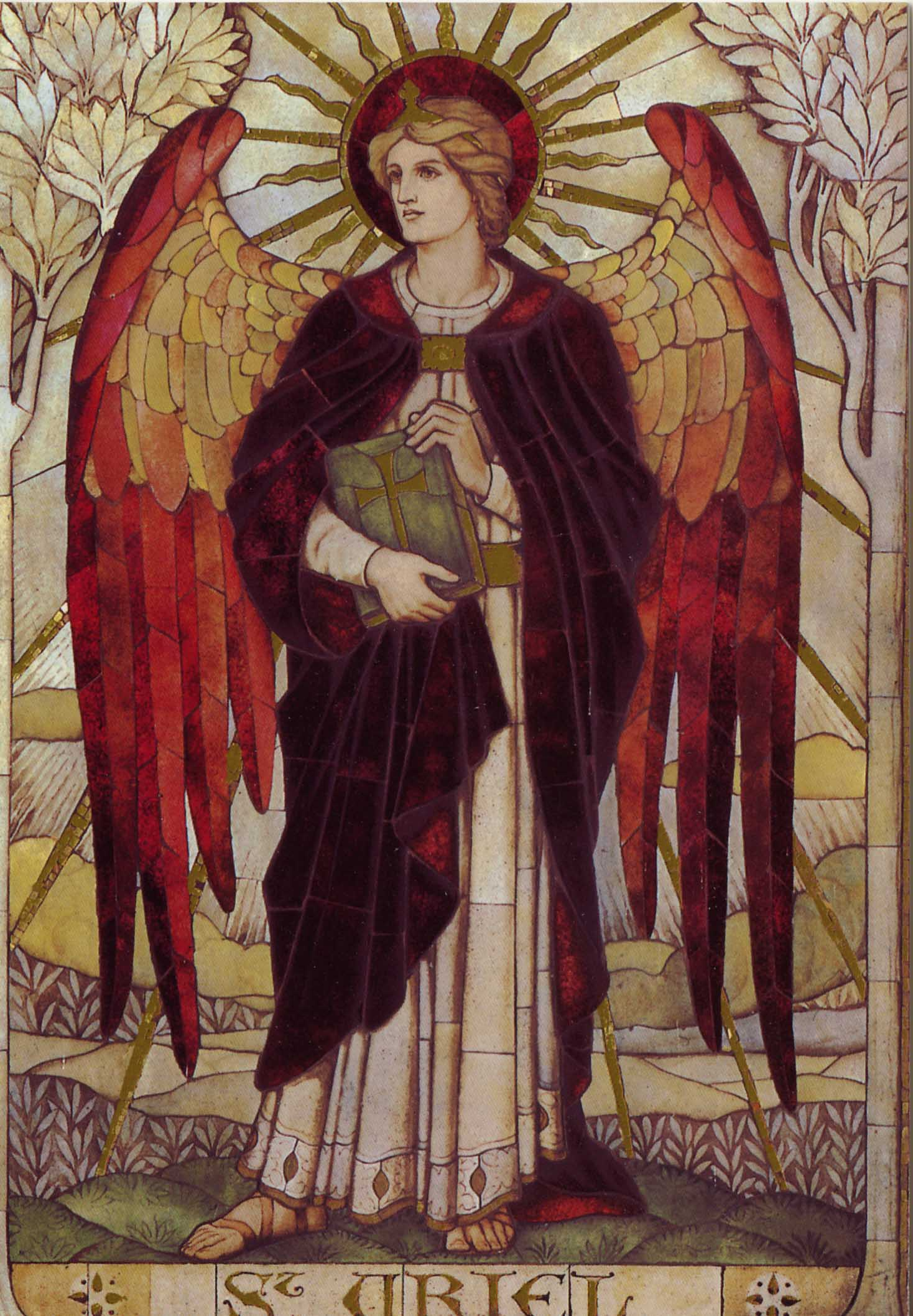 St. Uriel